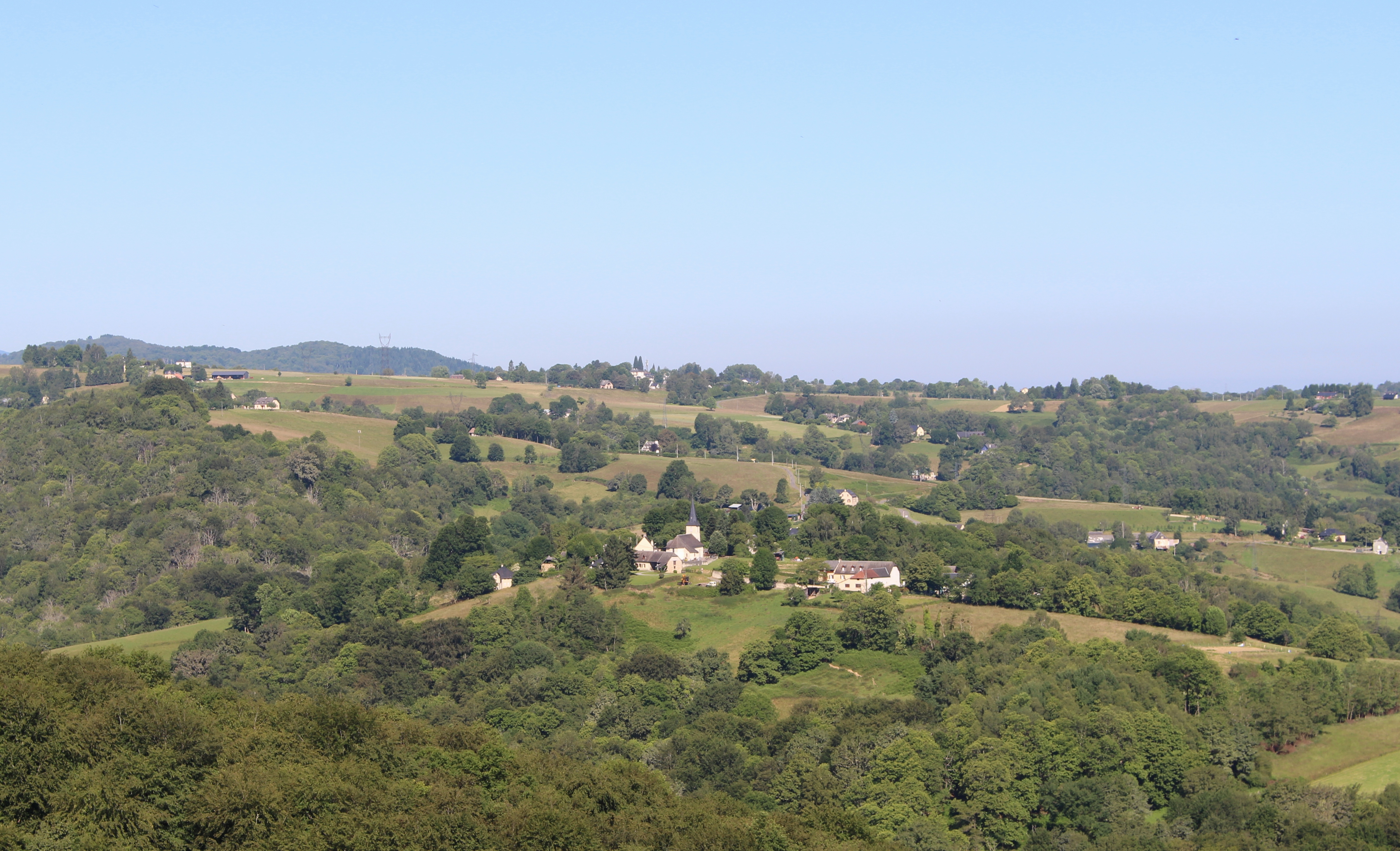 Uzer (Hautes-Pyrénées)